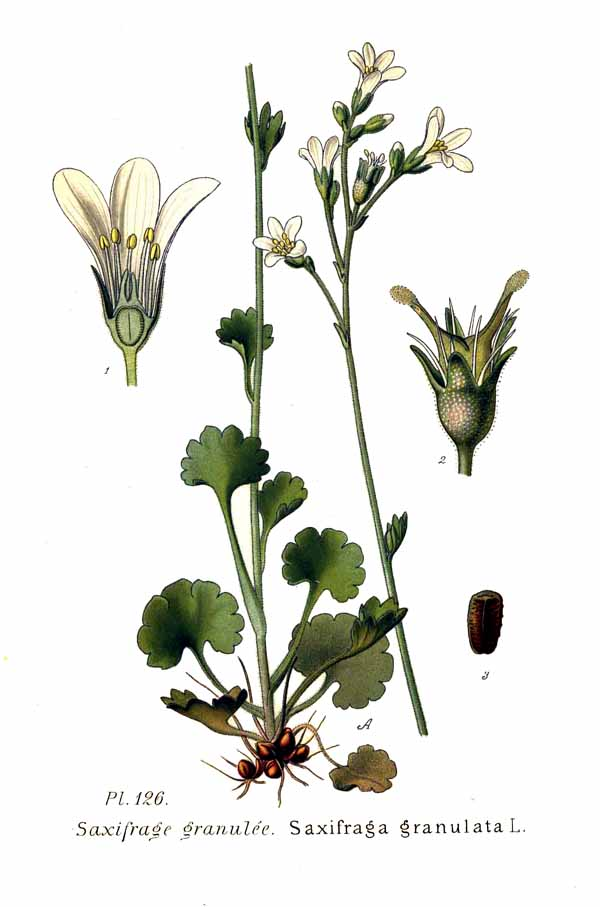 Saxifraga granulata L.